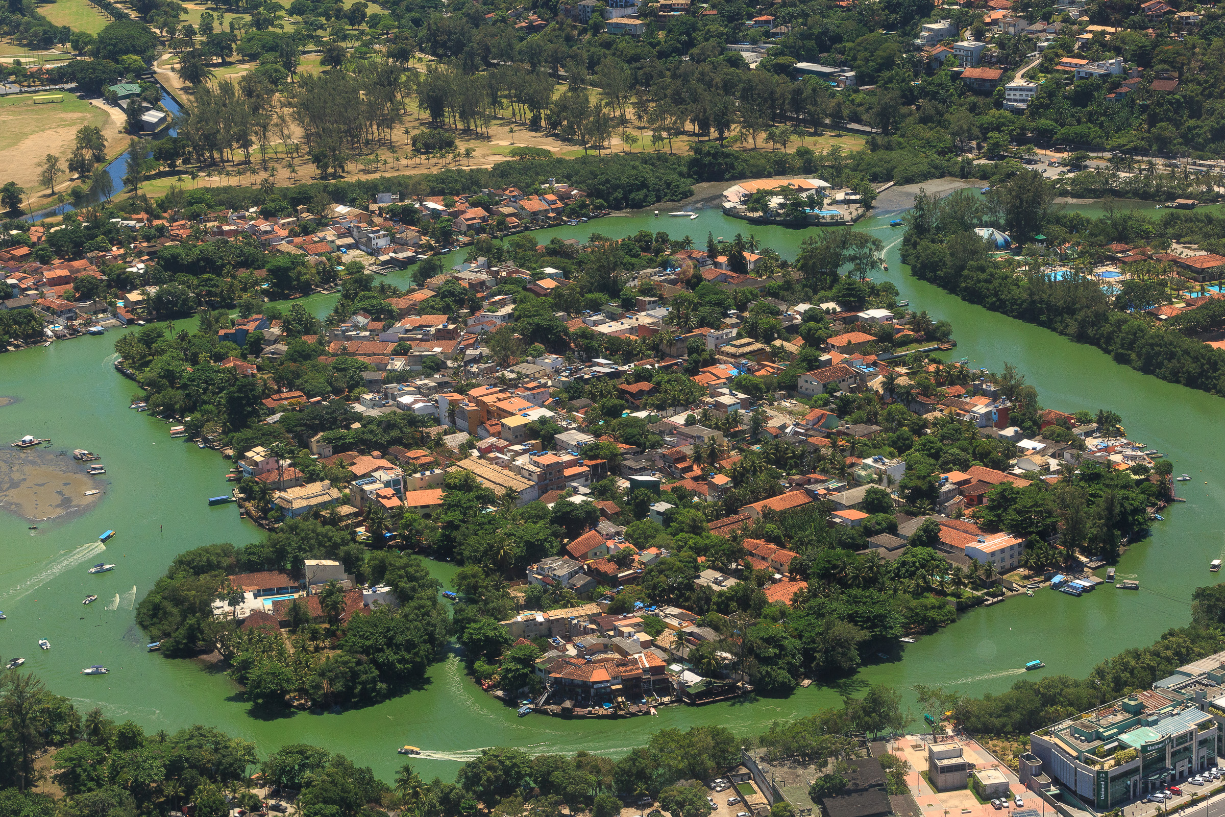 Vista aérea da Ilha da Gigóia, localizada na Barra da Tijuca na cidade do Rio de Janeiro